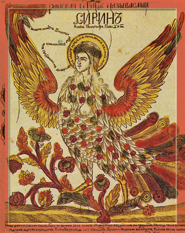 Сирин. Лубочная картина конца XVIII века или начала XIX в.